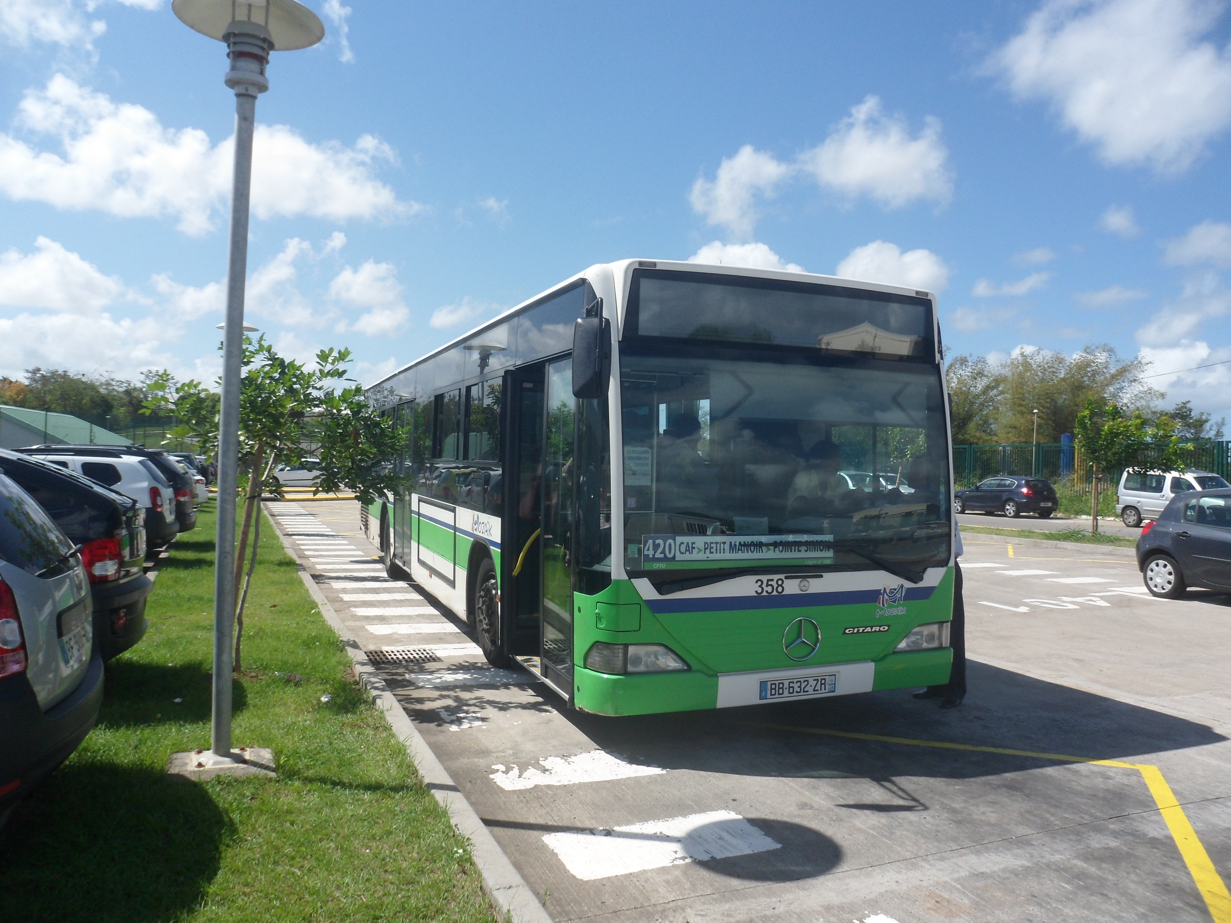 Un bus de la ligne 420 régule à son terminus Cité Hospitalière Mangot-Vulcin, au Lamentin, sur le réseau Mozaïk (Martinique).